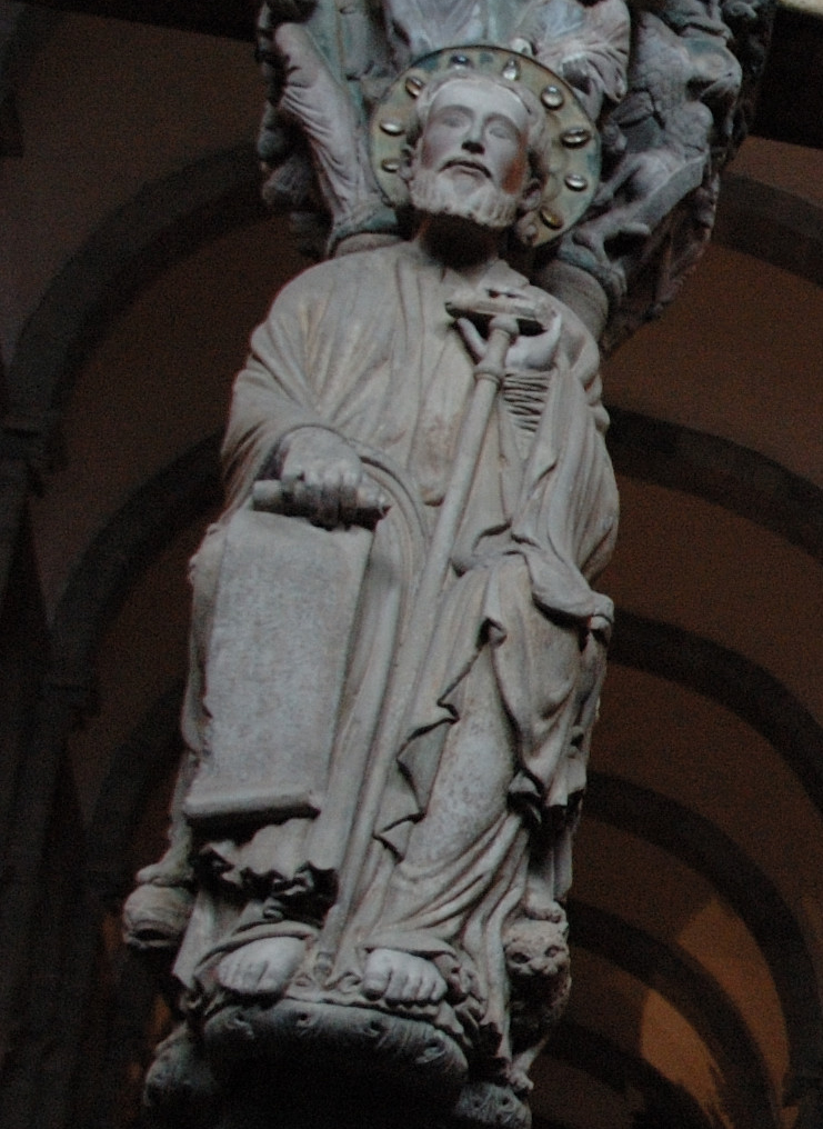 Apóstolo Santiago no parteluz do Pórtico da Gloria da catedral de Santiago de Compostela.